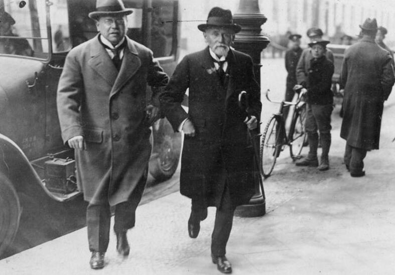 Zur Sitzung des Friedensausschusses am 8. Mai 1919 in Berlin; Die Reichsminister Erzberger und David begeben sich zur Sitzung